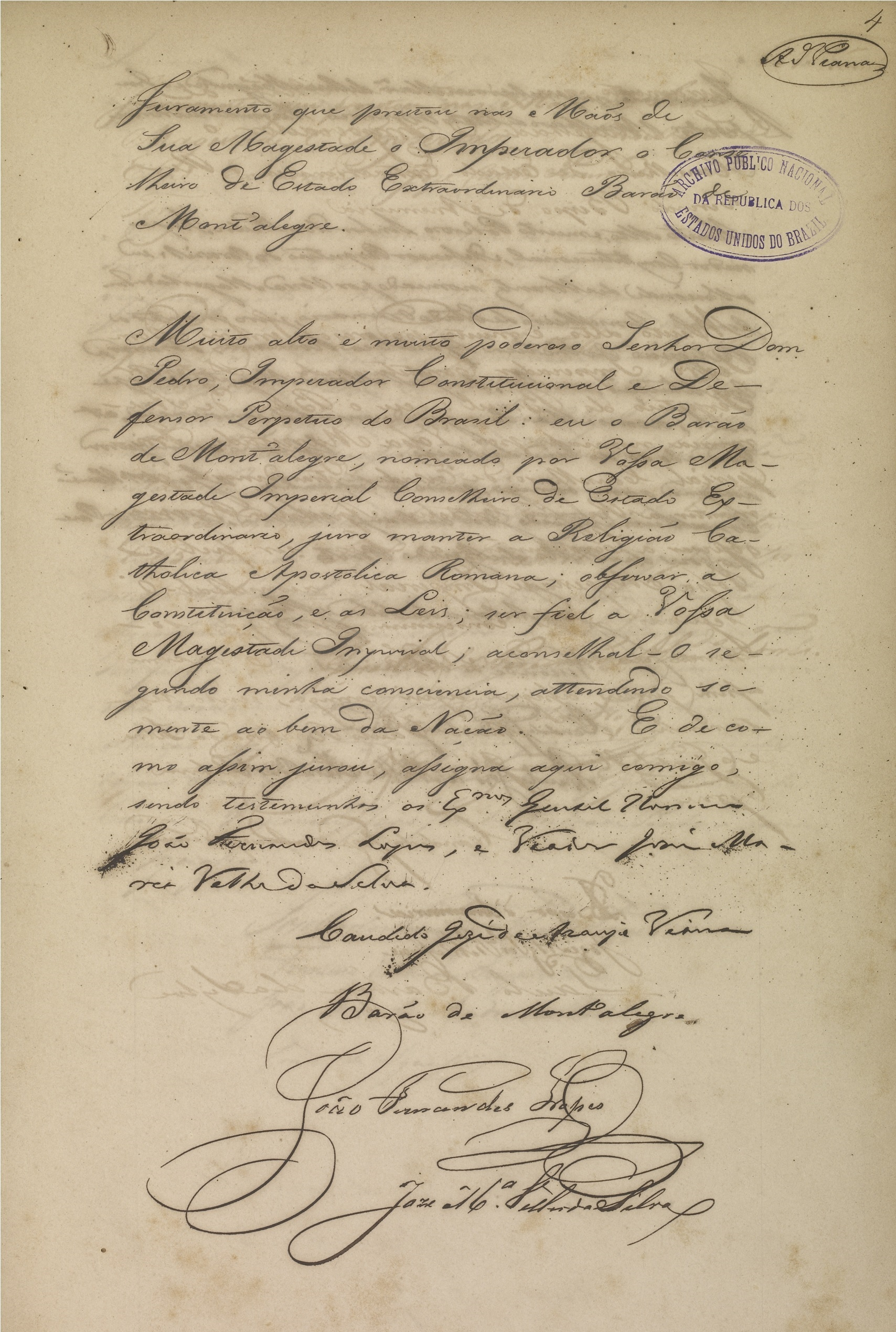 Fundo: Conselho de Estado.